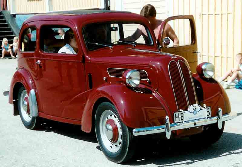 Ford Anglia Saloon